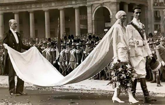 Napoli - Matrinonio di Amedeo di Savoia con Anna d'Orléans il 5 novembre 1927 a Napoli (qui in piazza del Plebiscito).